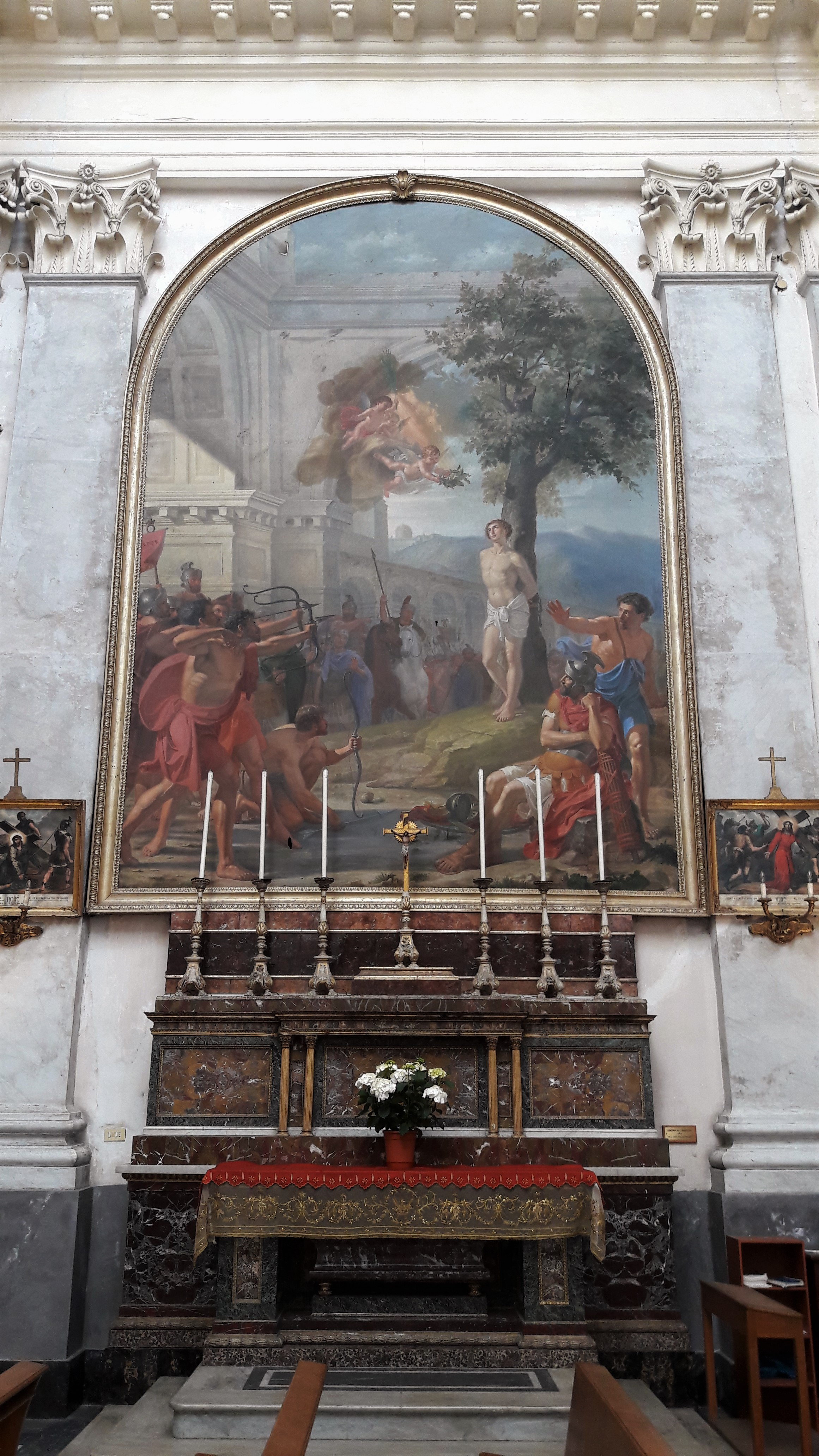 L'altare destro del Transetto sovrastato dalla tela di Antonino Bonaccorsi